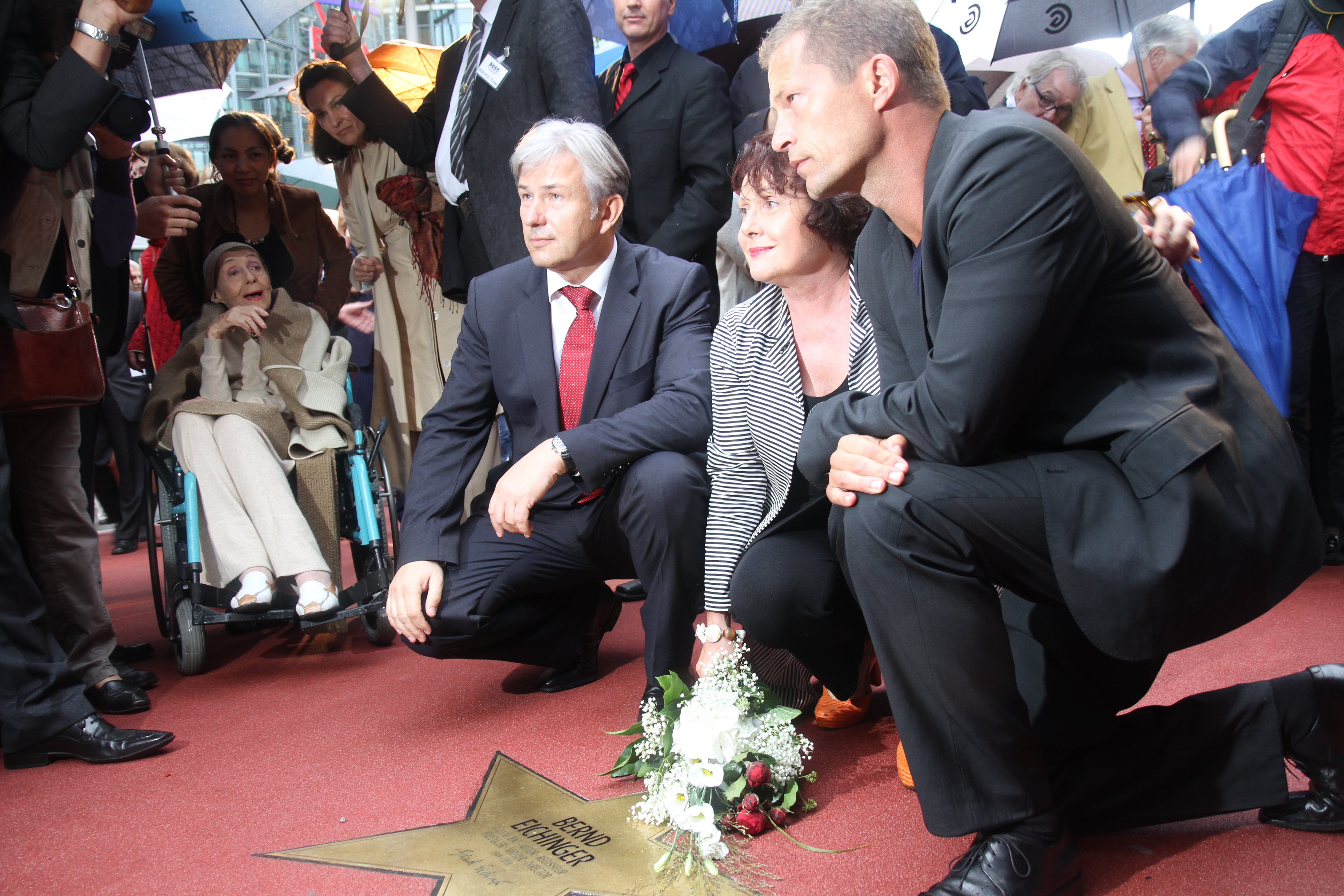 Klaus Wowereit, Til Schweiger und Luise Rainer vor dem Star von Bernd Eichinger